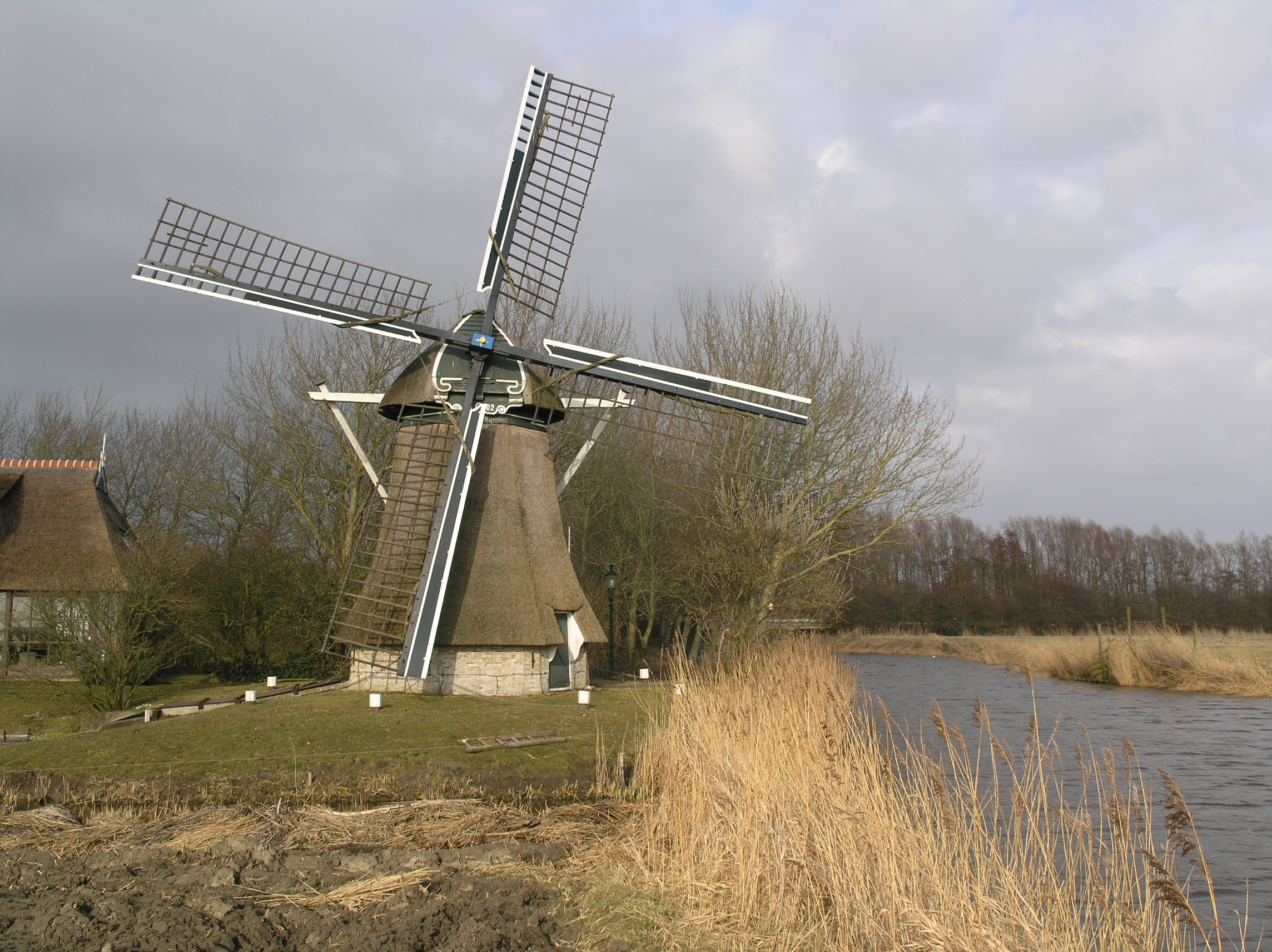 Menaldum Poldermolen De Kievit